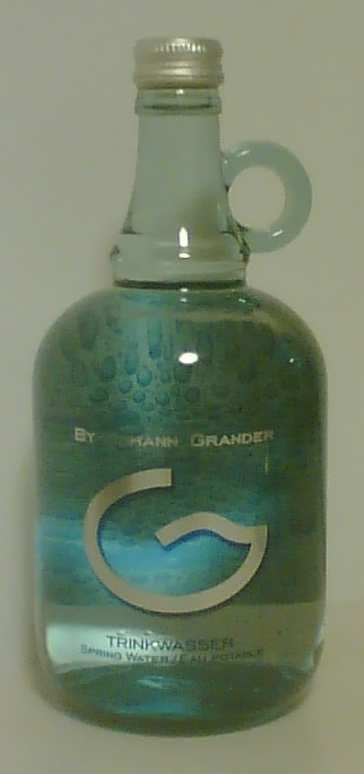 Eine Flasche Mineralwasser mit dem "Grander-Effekt"